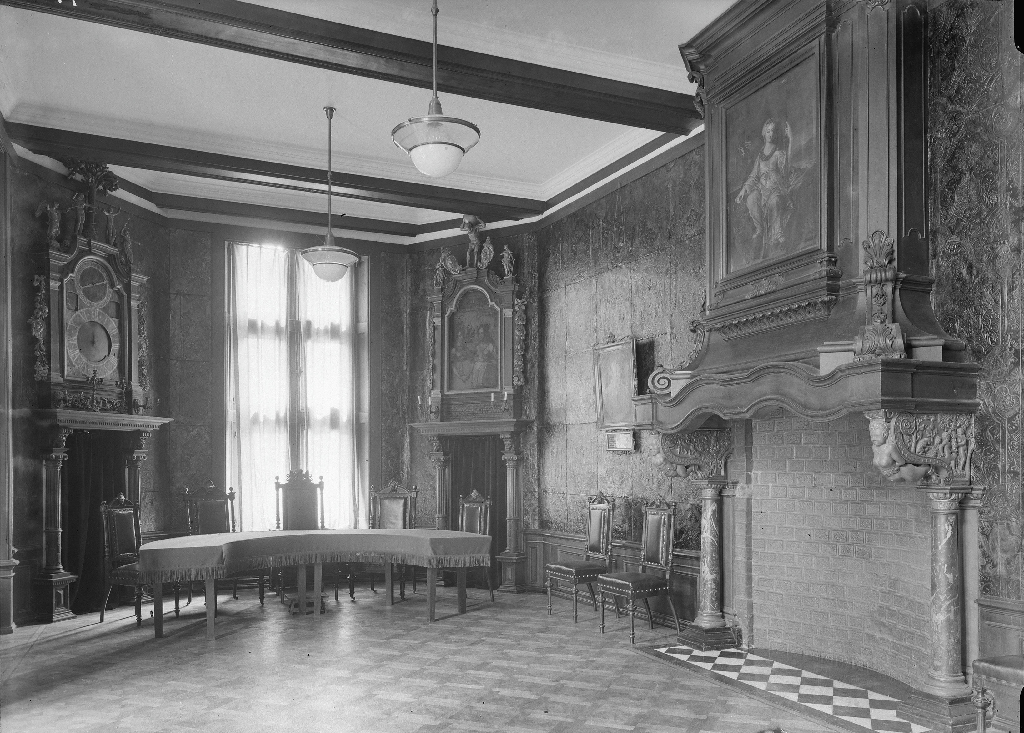 Raadhuis: interieur raadzaal